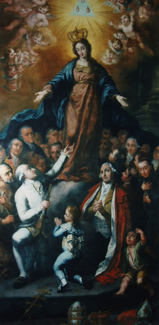 Cuadro de F. Rietmayer situado en la Calle Rosario de Cádiz, España.